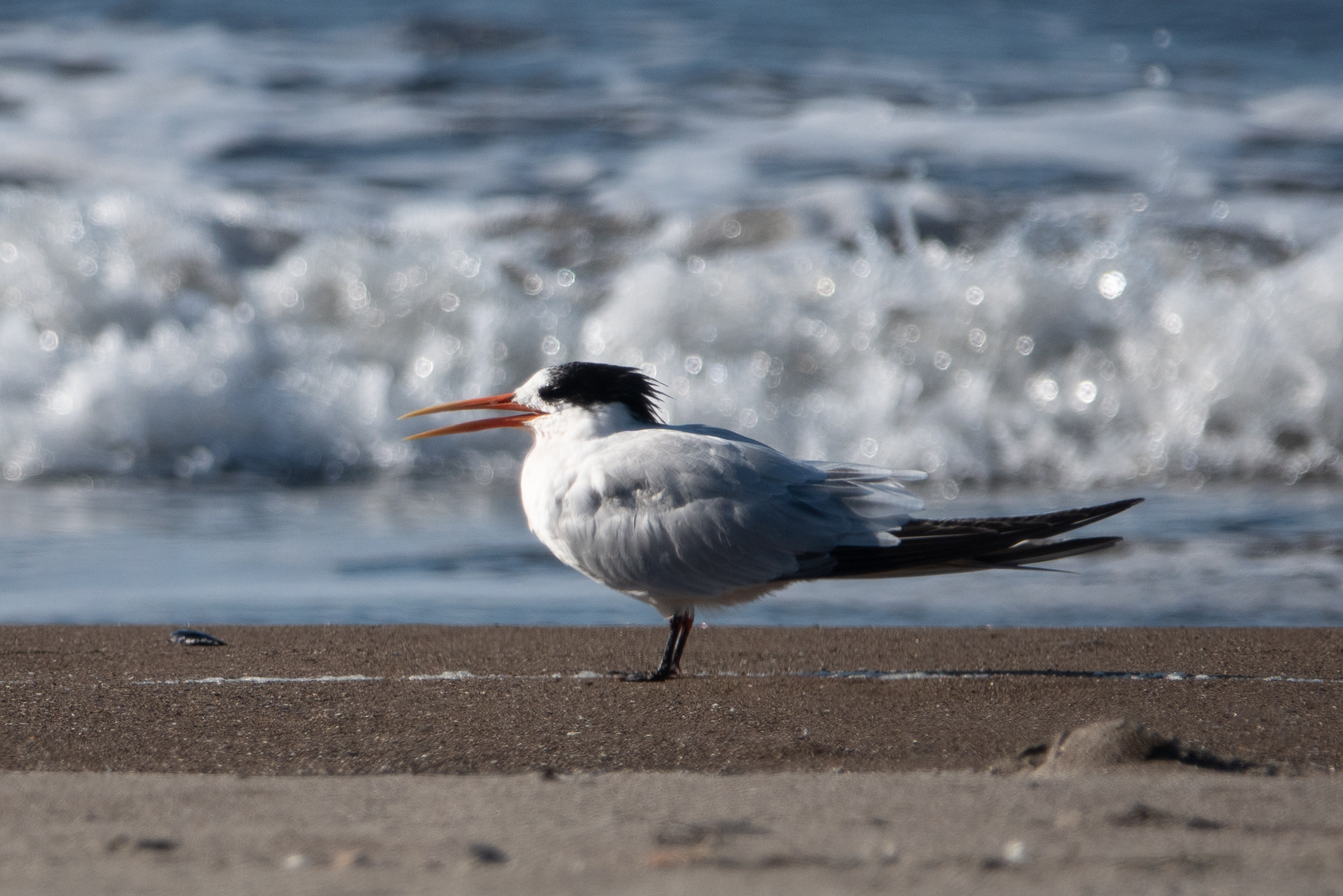 Elegant Tern | Stinson Beach | CA|2018-09-20|09-08-37